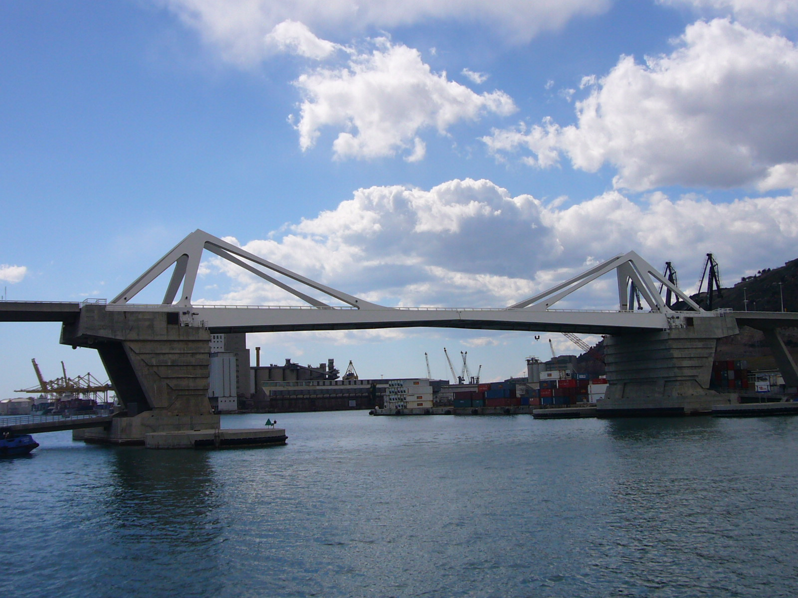 Puente Porta Europa en el puerto de Barcelona